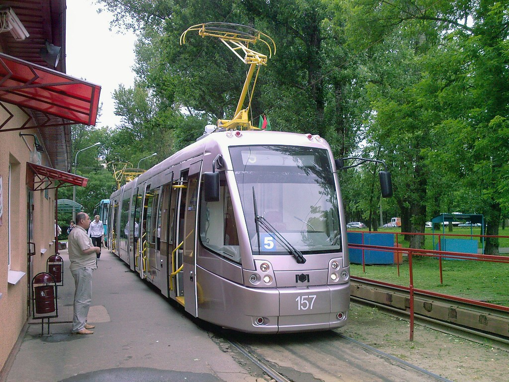 АКСМ-843: первый день работы на линии